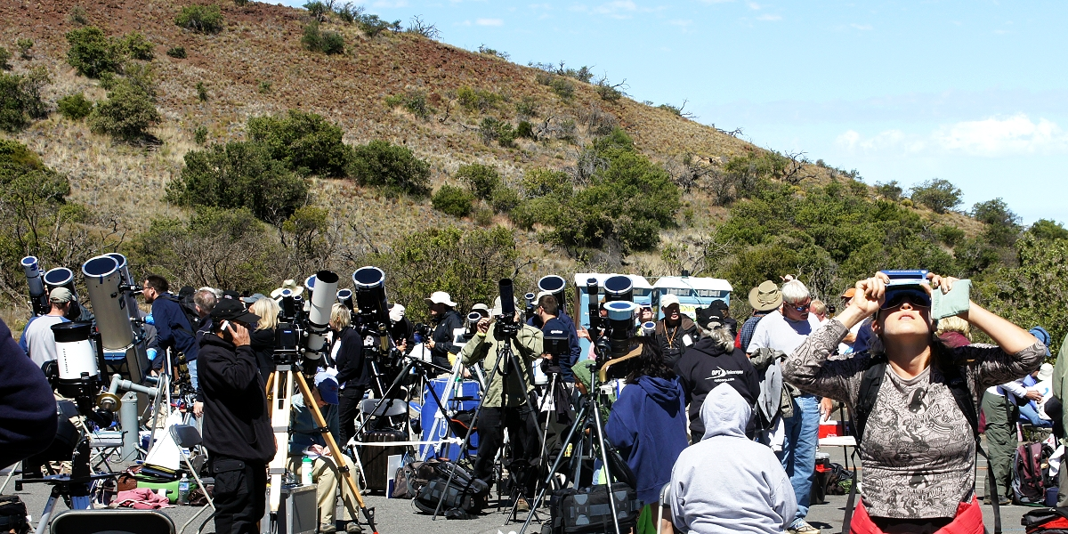 Наблюдение за прохождением Венеры по диску Солнца на Мауна-Кеа. Иллюcтрация для викиуебника Гавайеведение